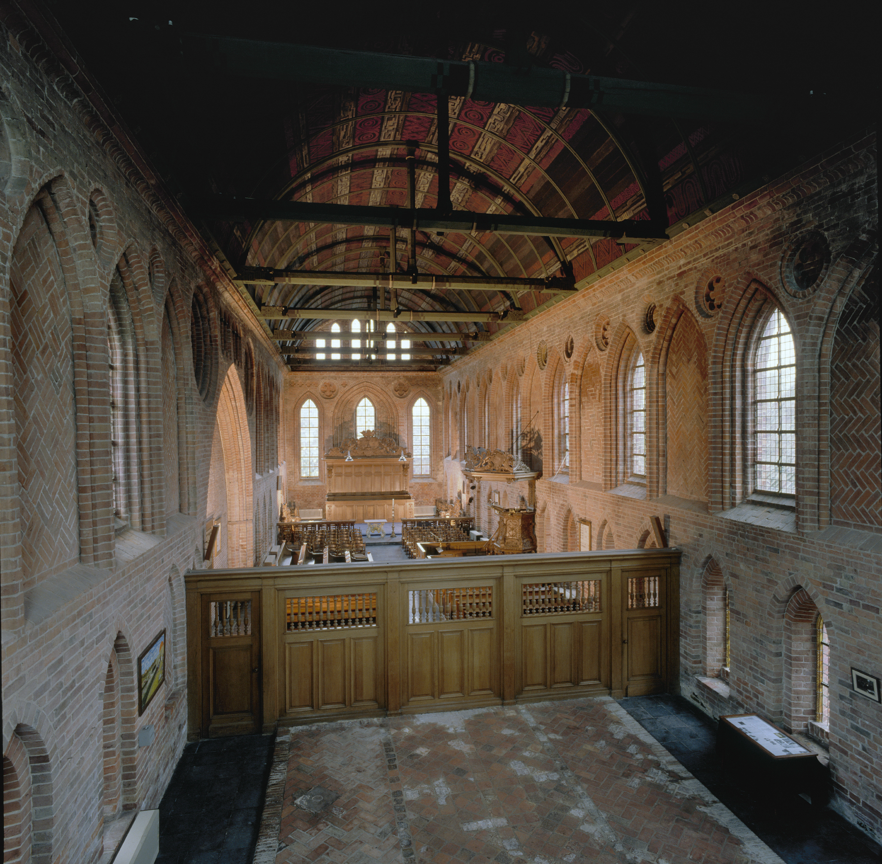 Nederlands Hervormde Kerk: Interieur naar het oosten (opmerking: Gefotografeerd voor Monumenten In Nederland Groningen)